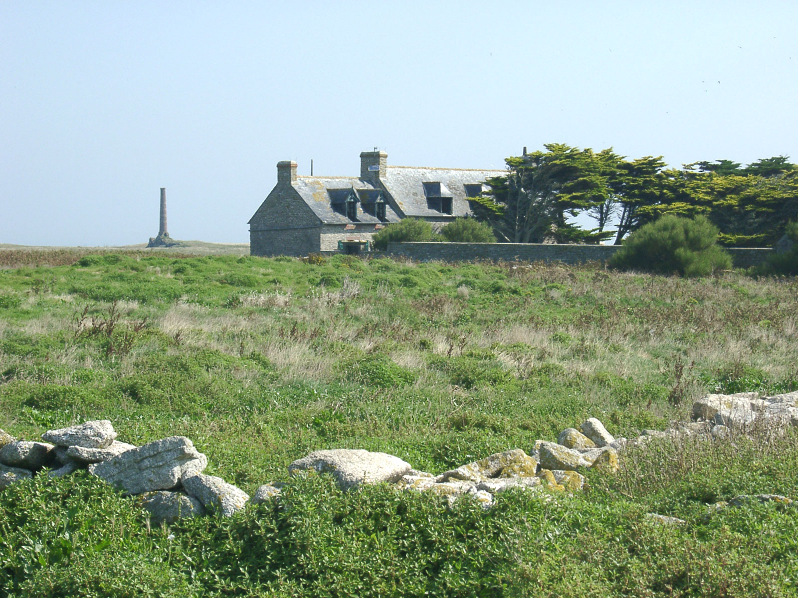 Description : Maison abandonnée et cheminée ile du Loc'h Lieu : Ile du Loc'h, Archipel des Glénans, Bretagne, France Auteur : Pline Photo personnelle